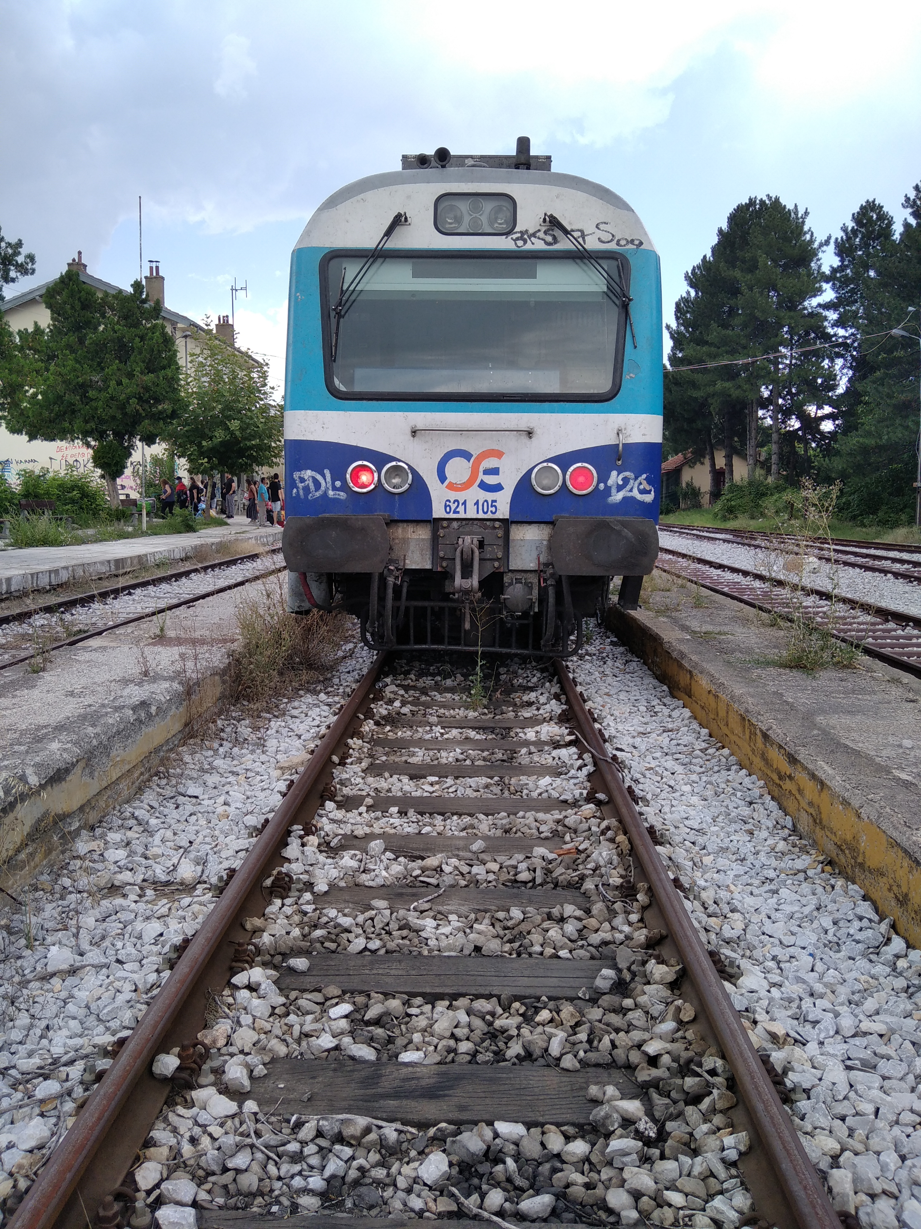 Γερμανική αμαξοστοιχία ΜΑΝ S 2000 στις 15 Αυγούστου 2020 στη Φλώρινα (Αμαξοστοιχία 83 / 86)